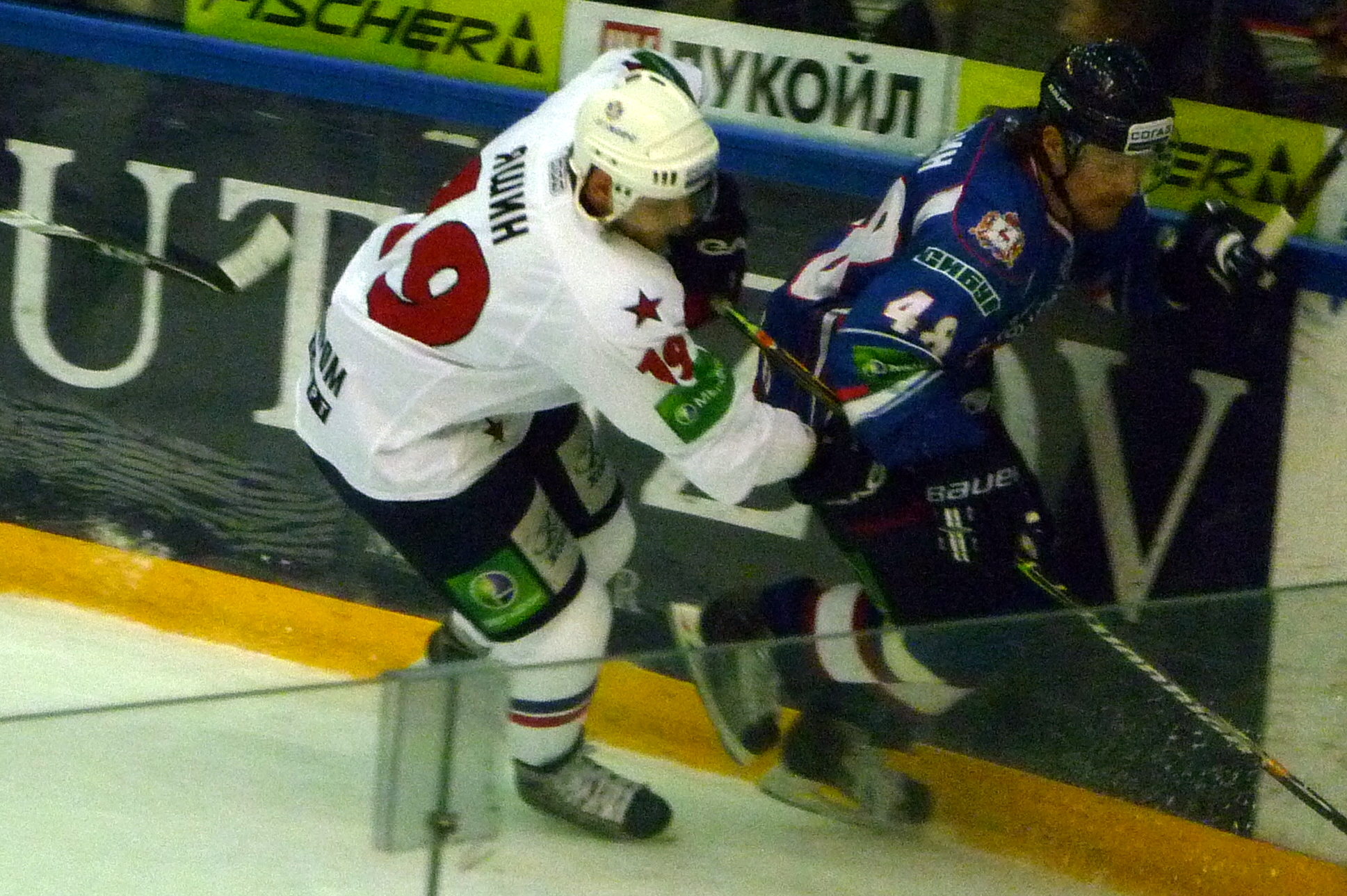 Нападающий СКА СПб Алексей Яшин борется с защитником нижегородского «Торпедо» Сергеем Розиным